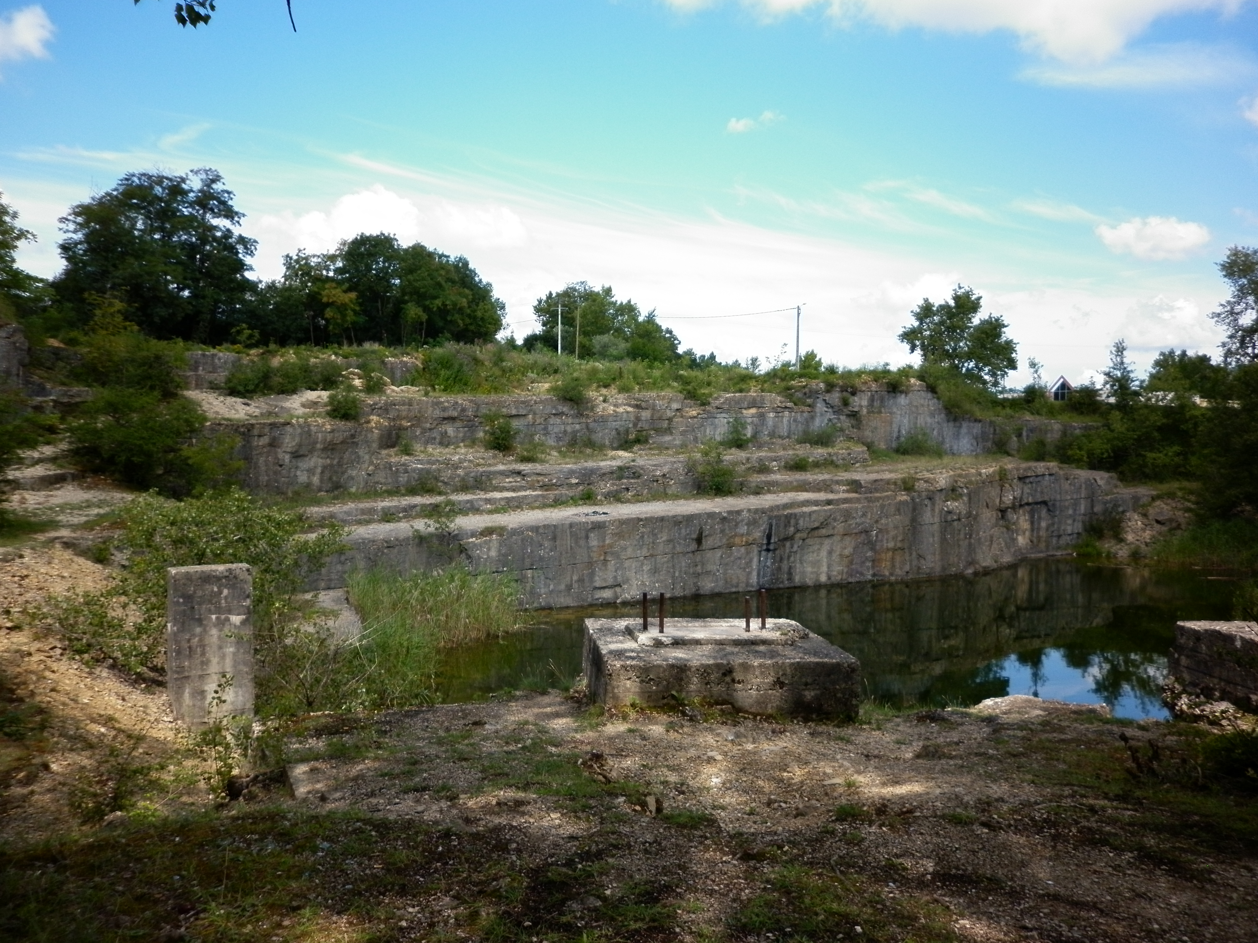 Ancienne carrière dite "des Galoches" à Montalieu-Vercieu. De nos jours, envahie par les nature.